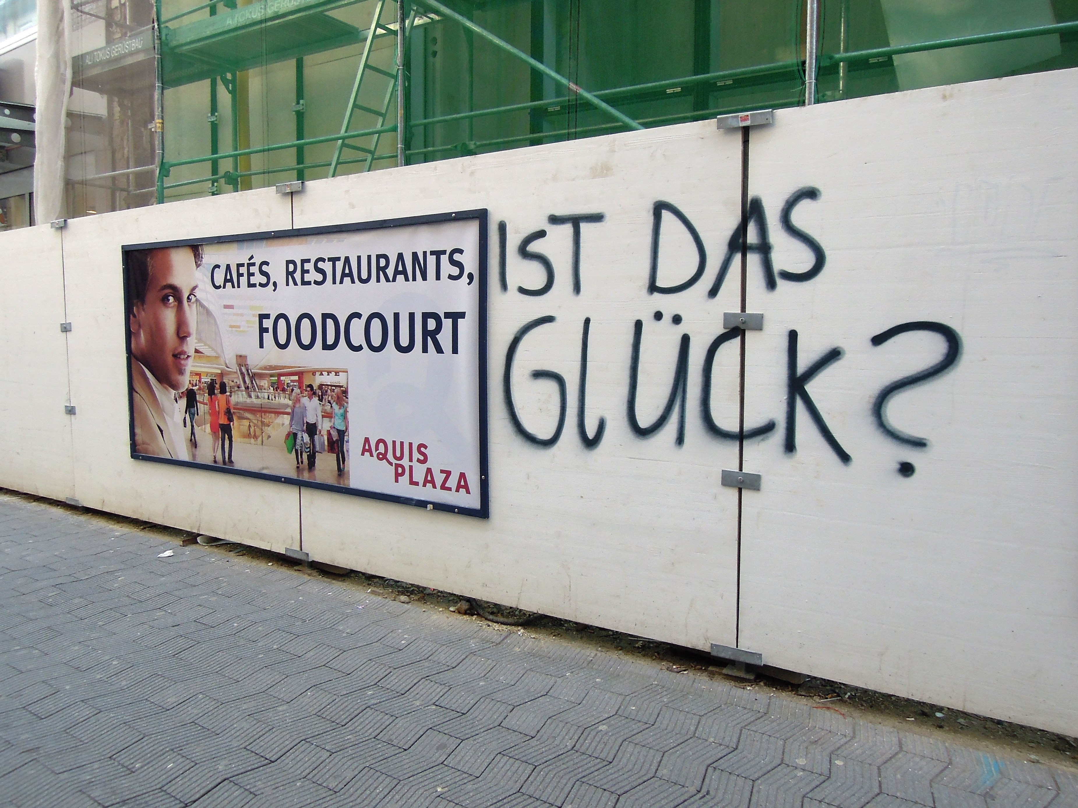 Am Kaiserplatz in Aachen entsteht das Einkaufszentrum "Aquis Plaza". Ein Blick auf die Baustelle im Januar 2015.